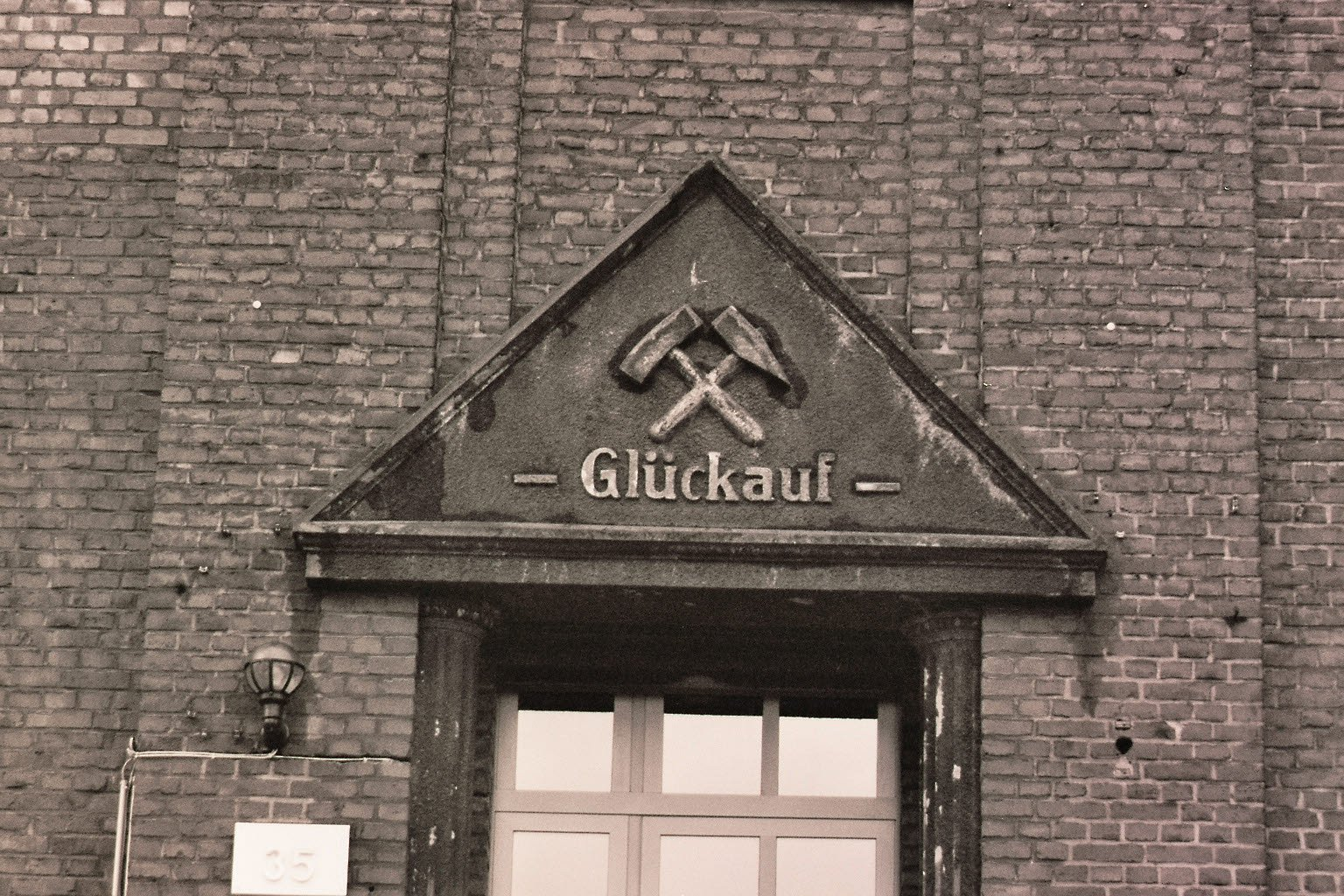 Spruch „Glückauf!“ am Verwaltungsgebäude der Zeche Alte Haase, Deutschland